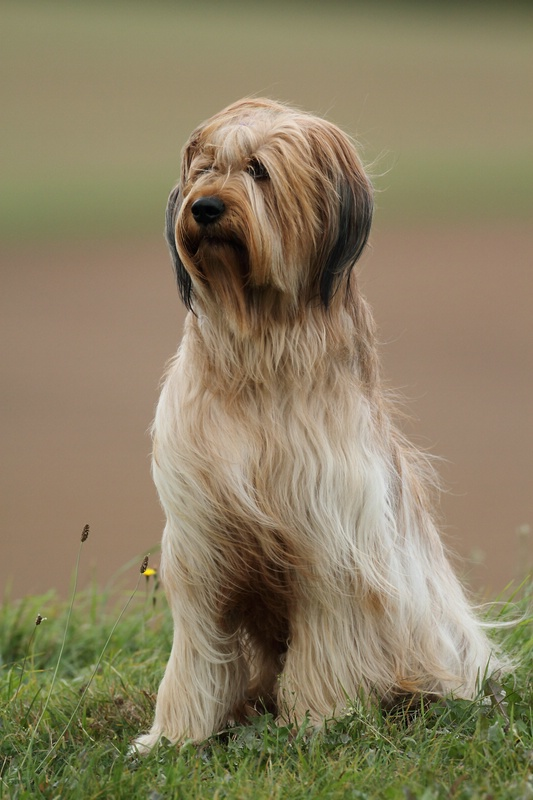 Fotoshooting mit einem Briard